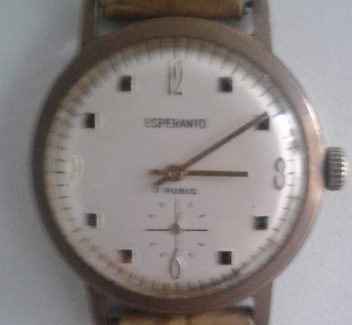 Mekanika brakhorlogxo de la marko Esperanto